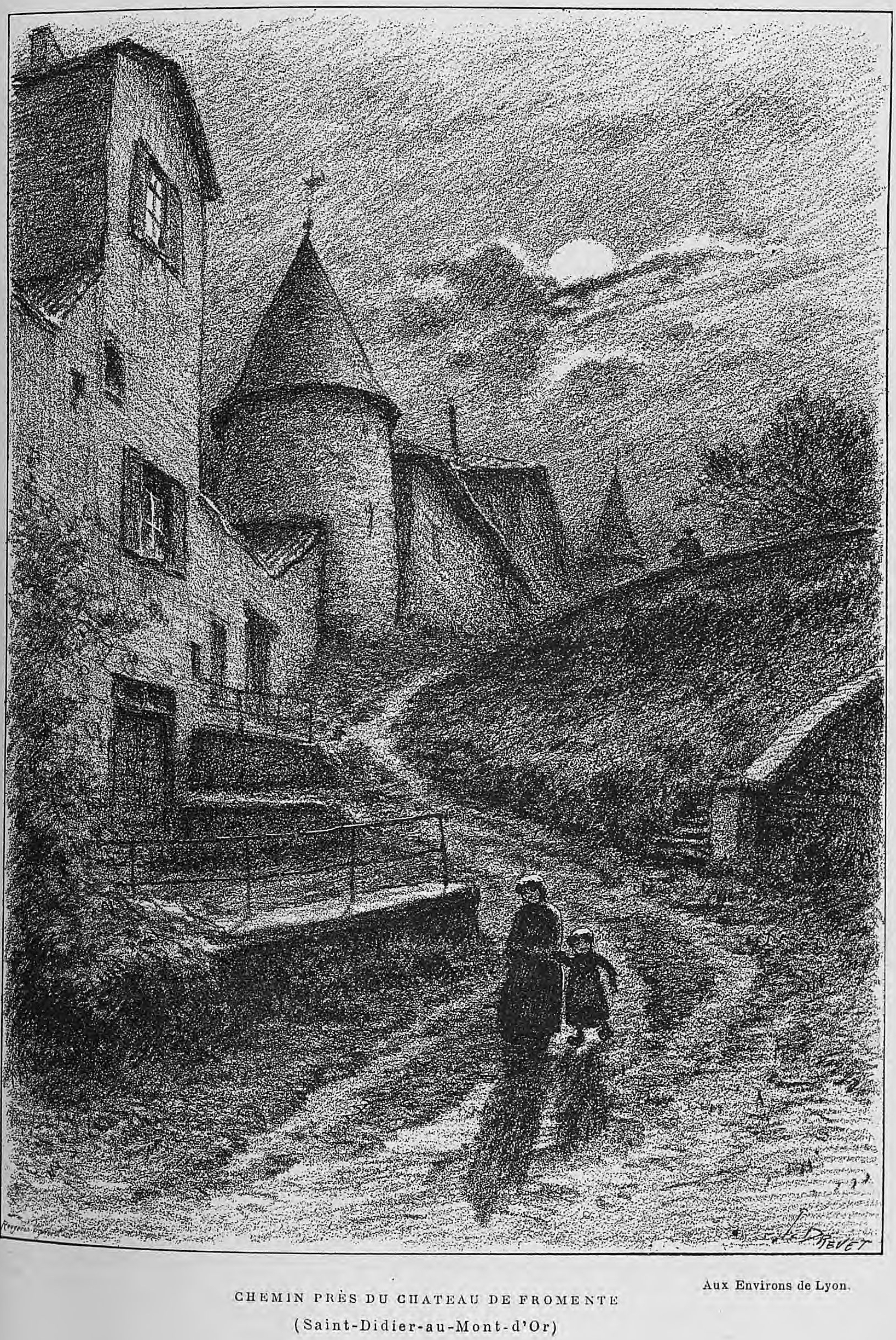 Aux environs de Lyon / Monsieur Josse ; préface de M. Coste-Labaume ; édition illustrée de 250 dessins de J. Drevet.